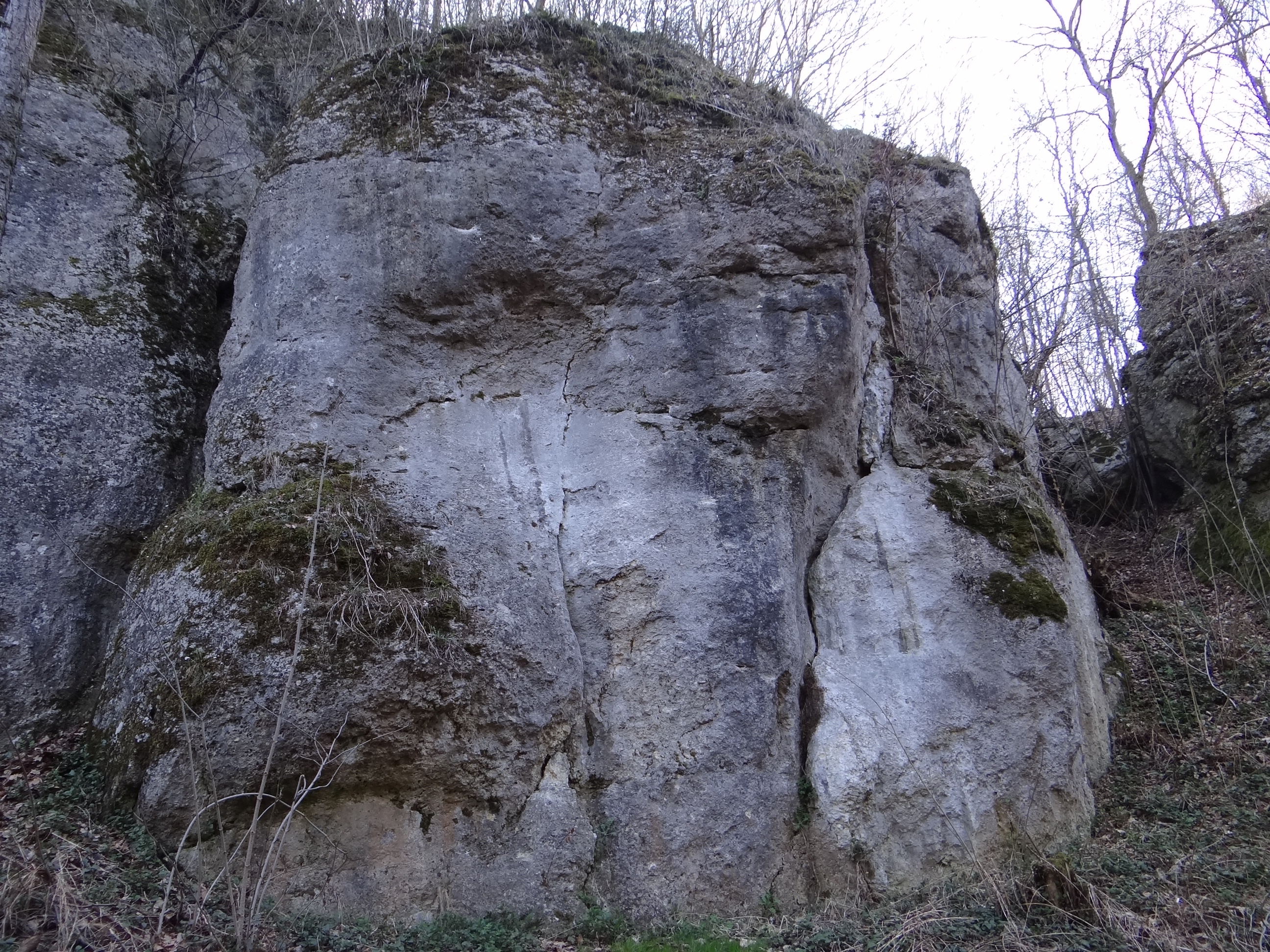 Żmijowe Skały w Dolinie Brzoskwinki